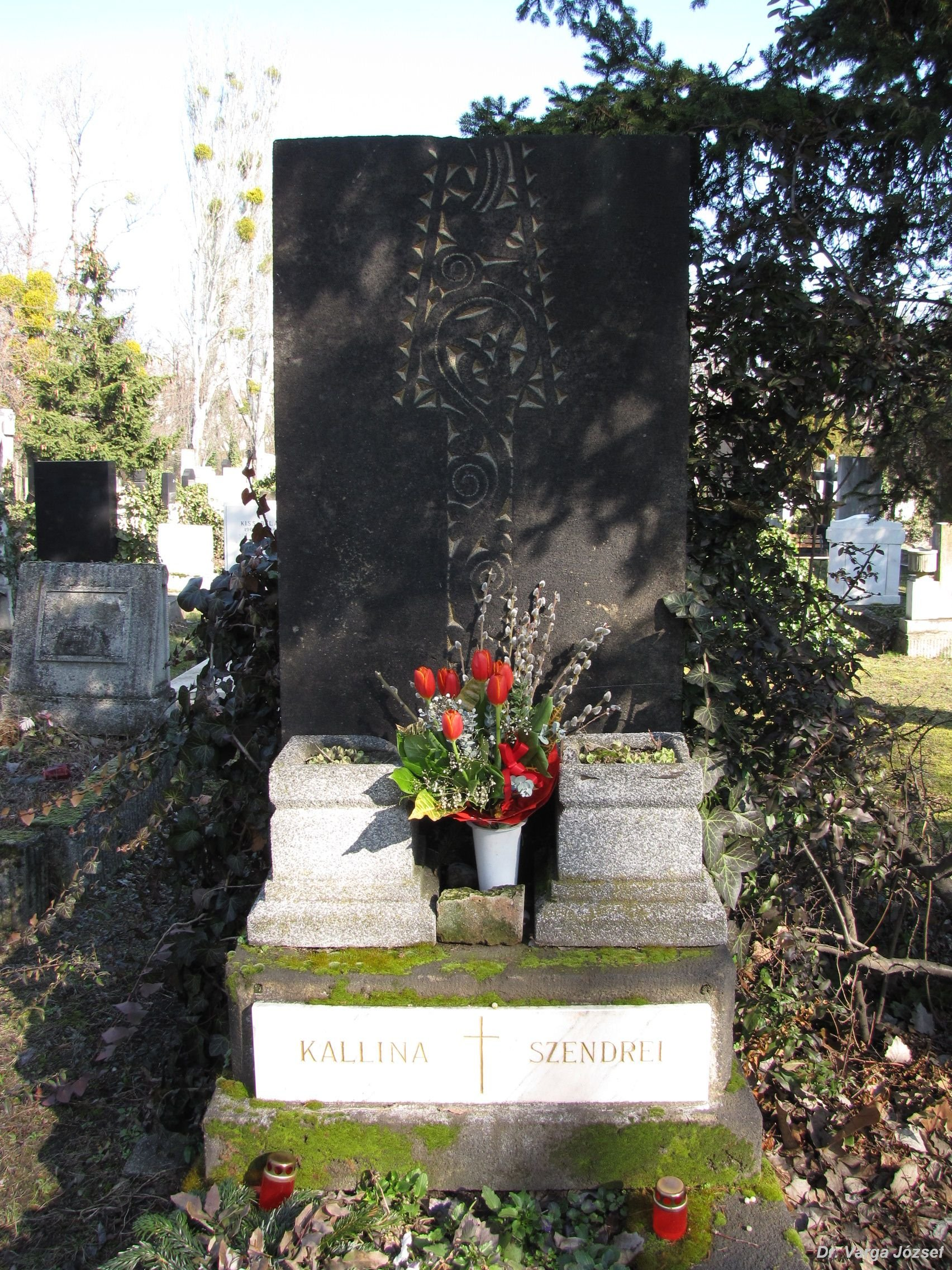 Kallina Mór (Gross – Bittesch, Morvaország, 1844. szeptember 20.–Budapest, 1913. május 5.) építész sírja Budapesten. Kerepesi temető: 34-3-6 [szobrász: Kallós Ede, építész: Árkay Aladár]